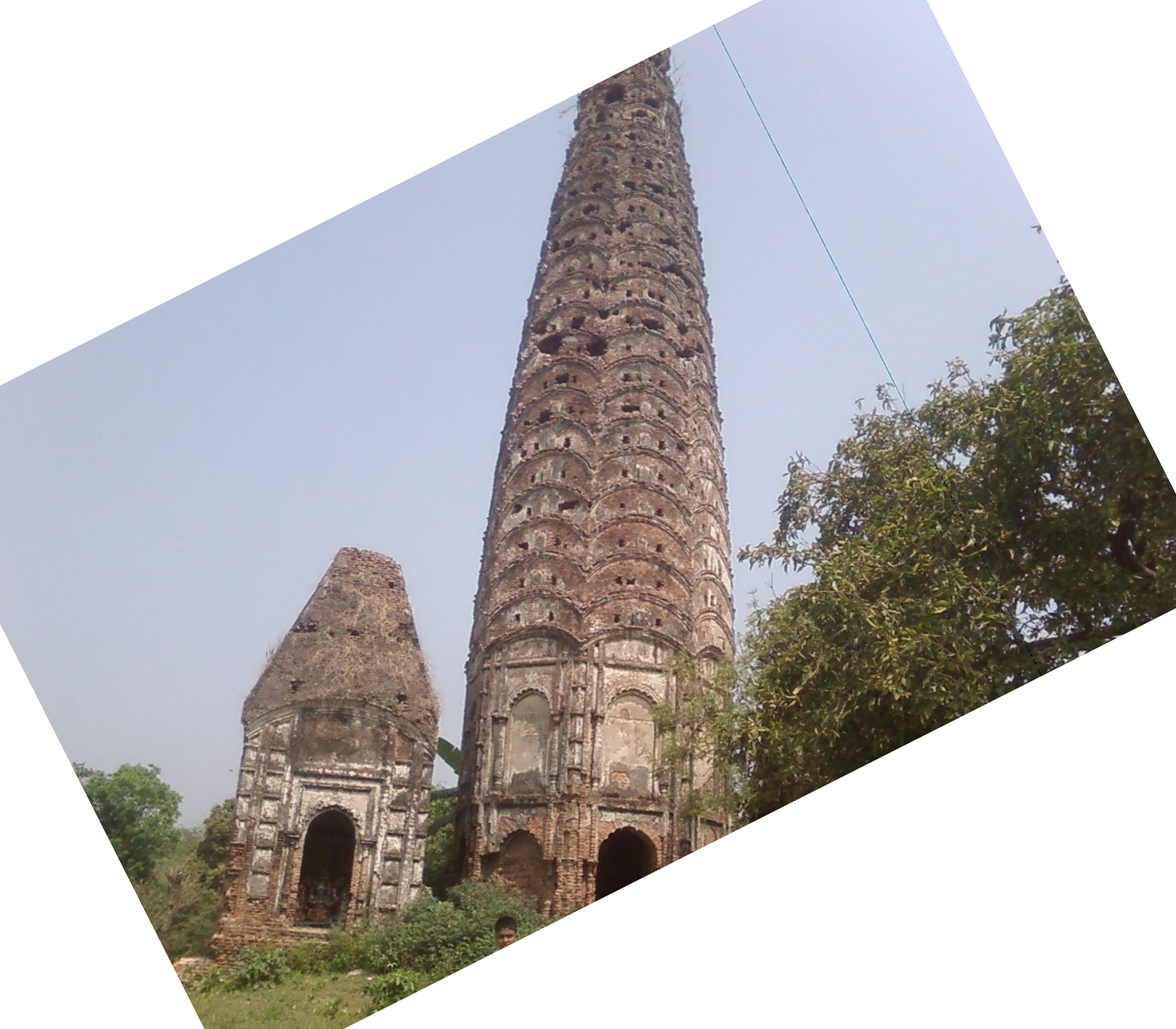 মাইজপাড়া মঠ